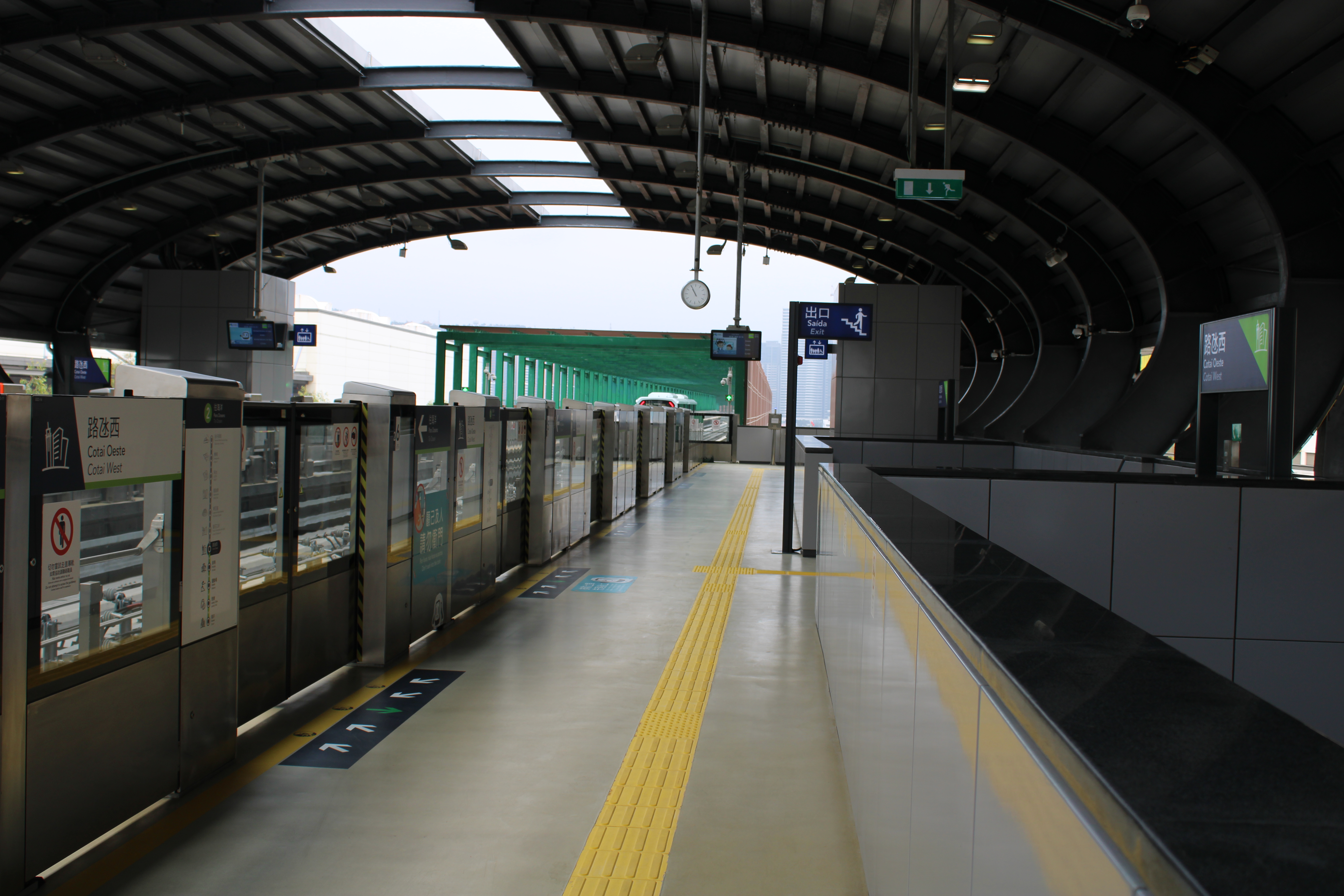 2019年12月的澳門輕軌氹仔線路氹西站月臺。